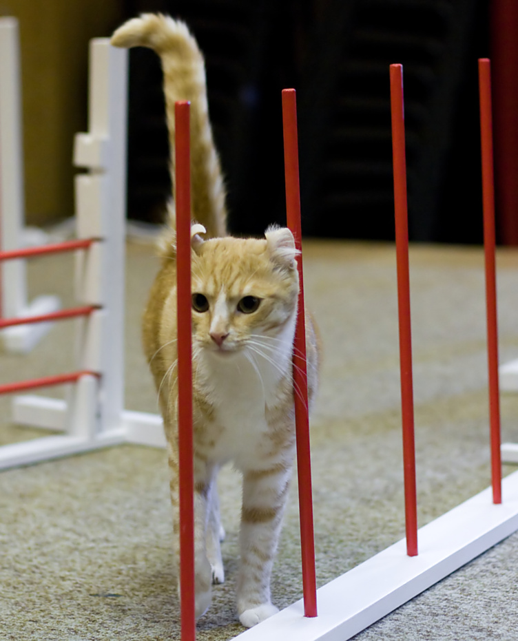 Un american curl à poil court réalise un parcours d'Agility félin durant l'American Curl presentation à Klaukkala en 2008. Code EMS : PR Siriuksen EeroCurl [ACS ds 09 24]